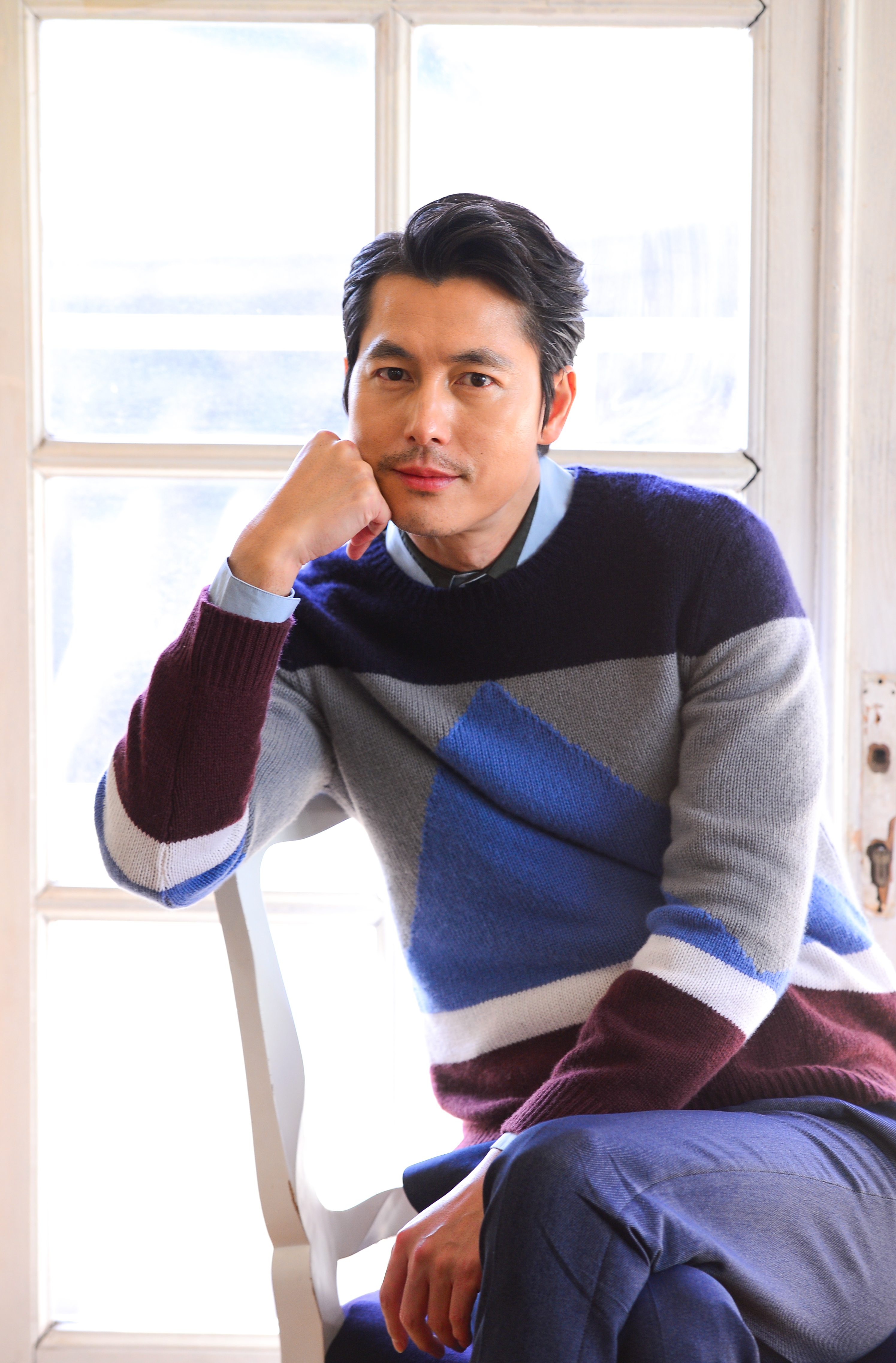 영화 의 주인공 정우성이 5일 서울 삼청동 한 카페에서 경향과의 인터뷰에 앞서 포토타임을 갖고 있다. 정우성, 김하늘 주연의 영화 는 교통사고 후 10년 간의 기억을 잃어버린 채 깨어난 석원(정우성)과 그 앞에 나타난 비밀스러운 여자 진영(김하늘)의 새로운 사랑을 그린 감성 멜로 영화다. 2016.01.05 / 이석우 기자